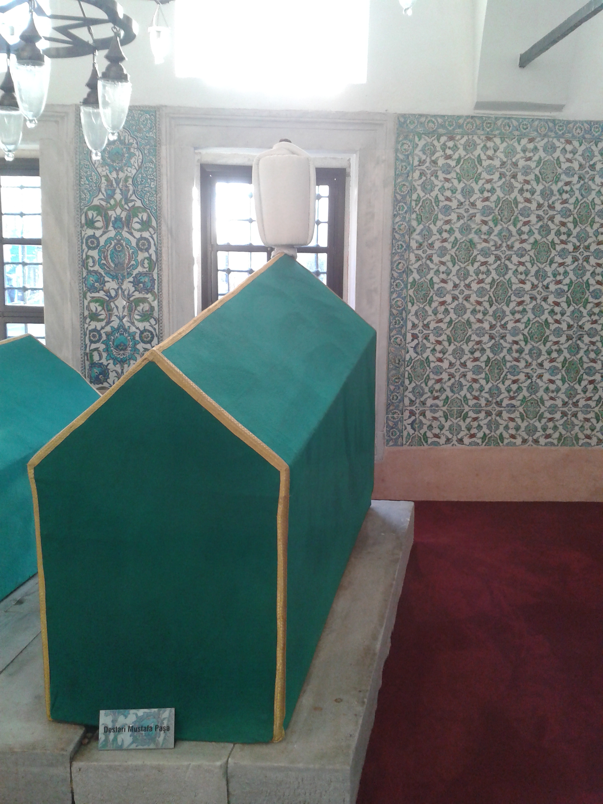 Destari Mustafa Paşa Kabri